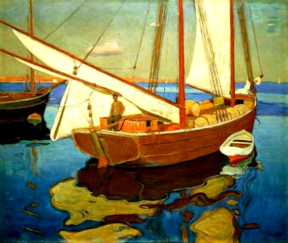 Головков Герасим Семенович Дубки (ок. 1905, масло, холст, 157х180,5) в собрании ОХМ